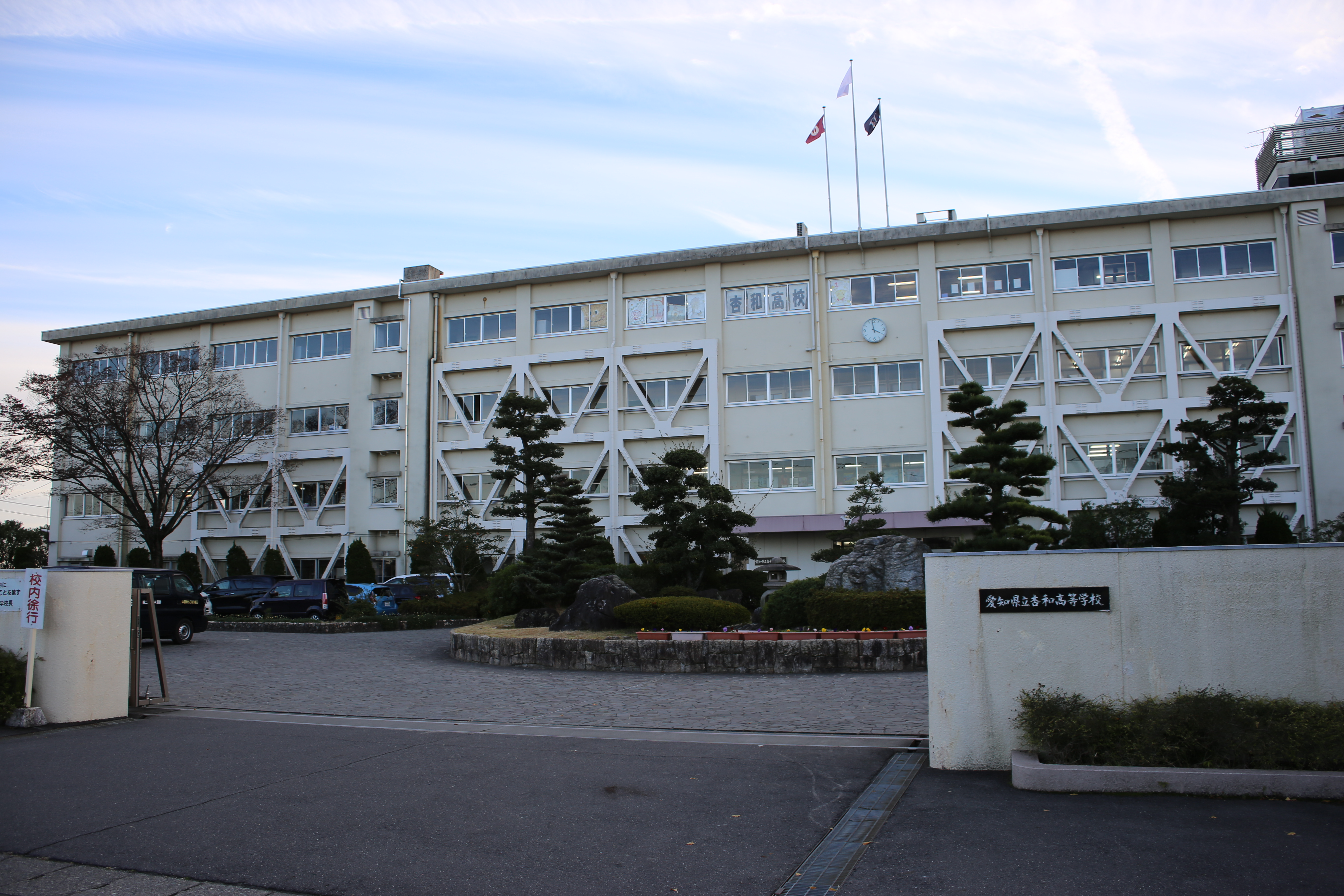 愛知県稲沢市の愛知県立杏和高等学校